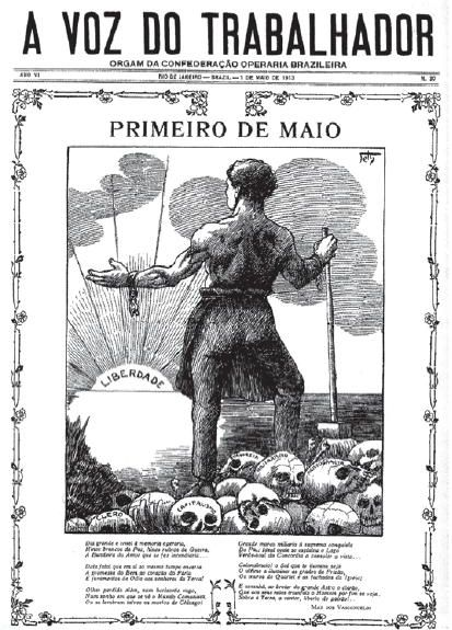 A Voz do Trabalhador: Jornal da Confederação Operária Brasileira. Rio de Janeiro, 01/05/1913.